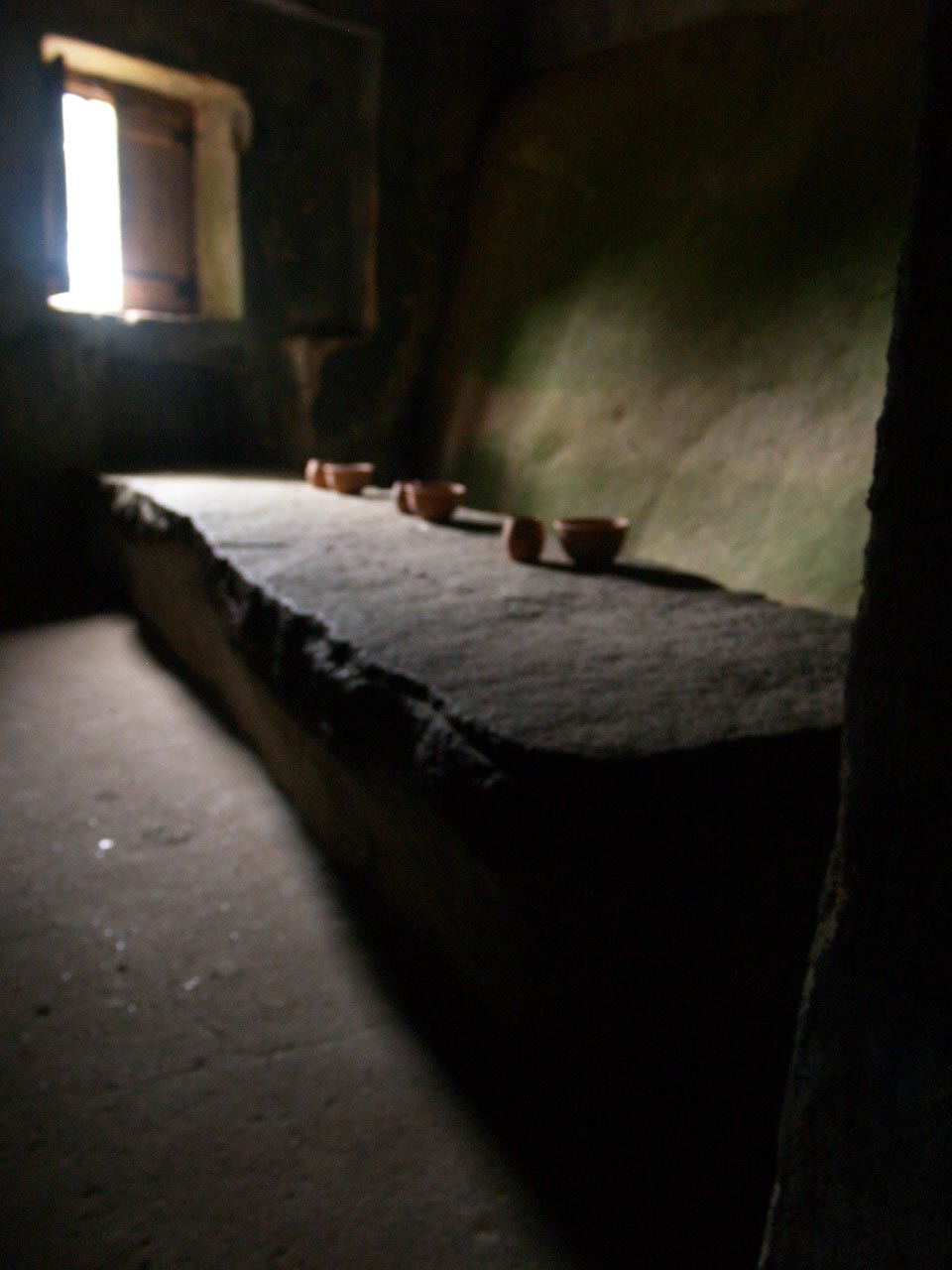 wlm_id: 6666431 Convento dos Capuchos